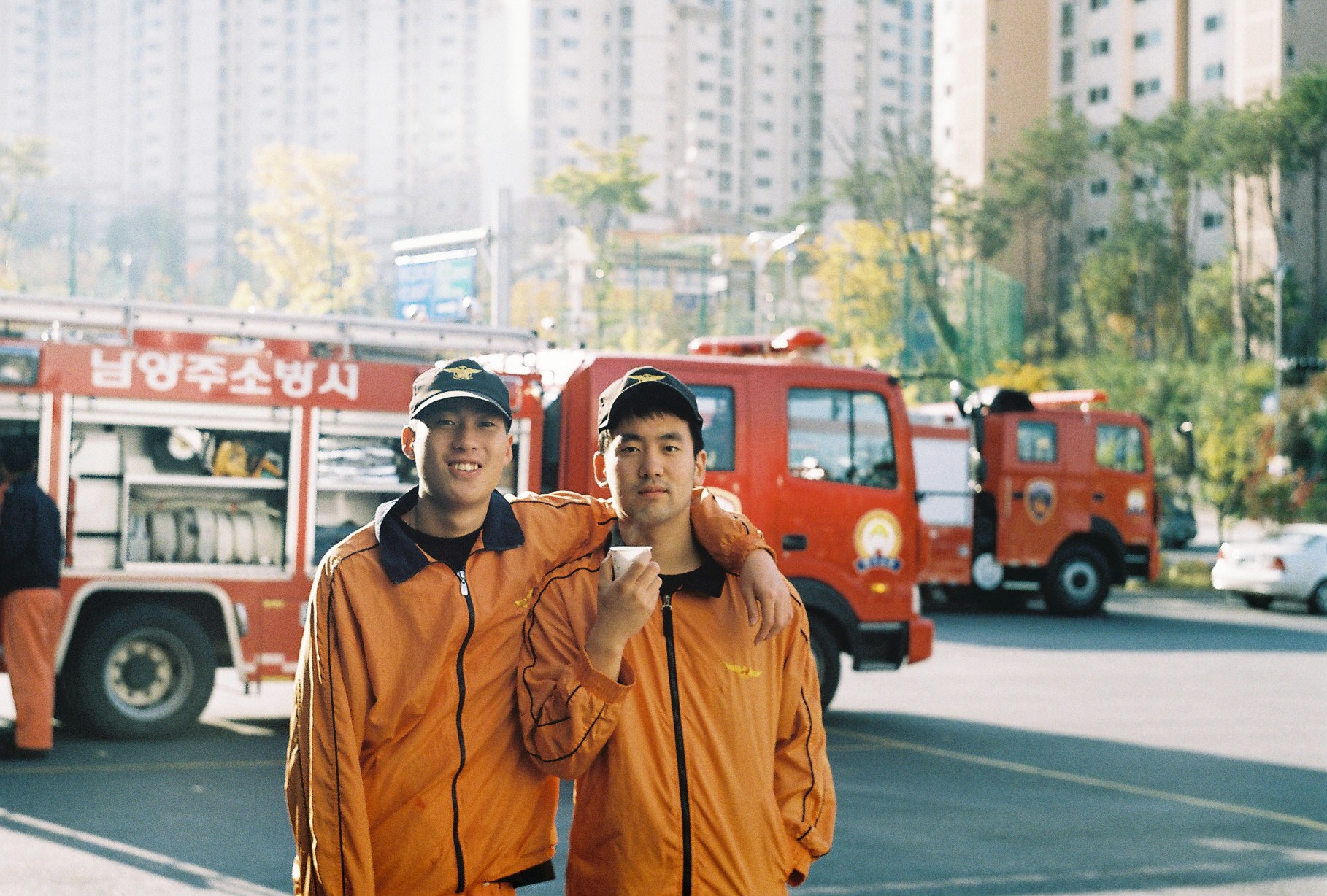 2007년 경기도 남양주소방서 의무소방대원, 박근록, 최광모